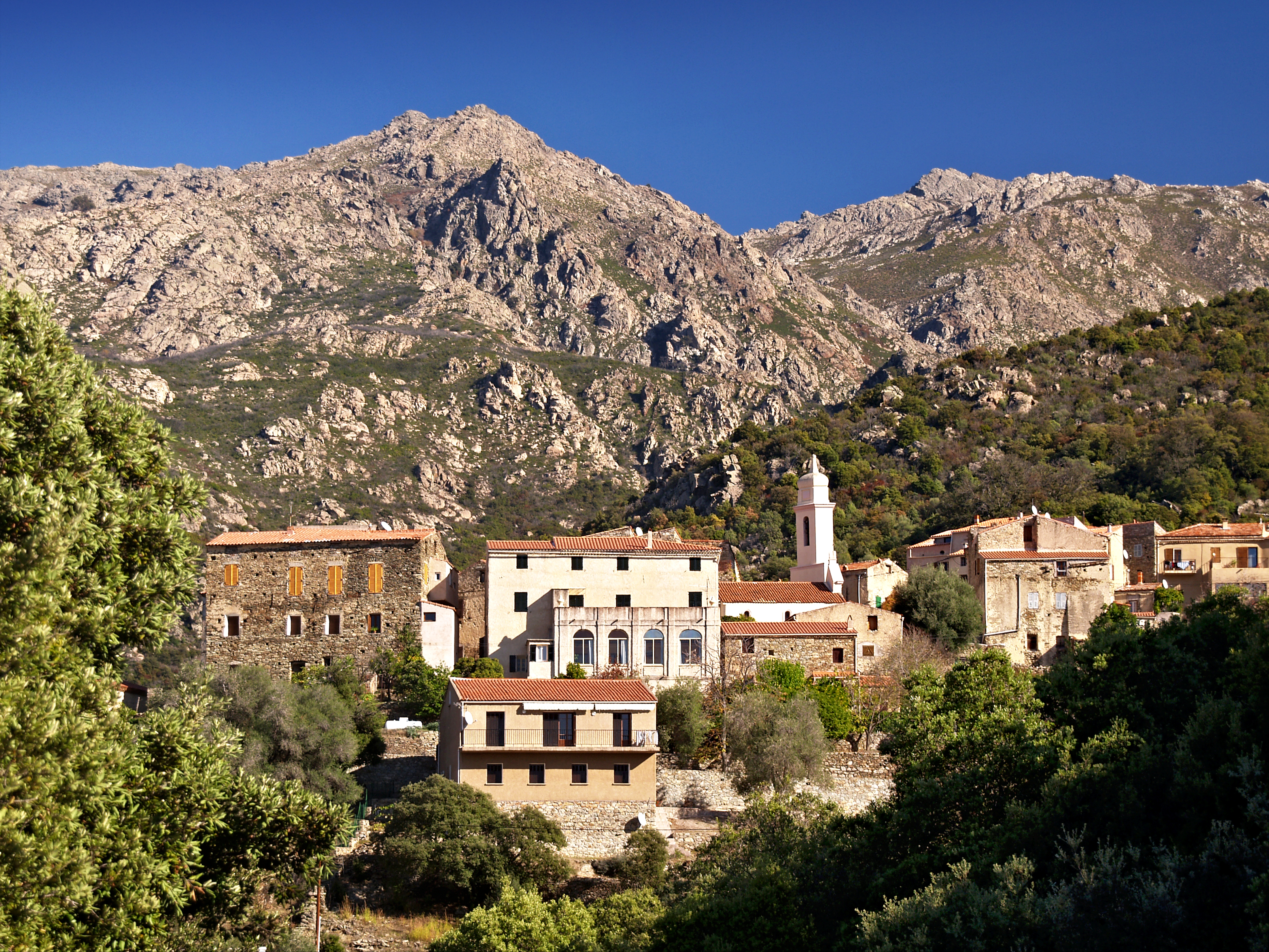 Urtaca (Corse) - Vue du villageCorsu: Urtaca (Corsica) - Un vede di u paese